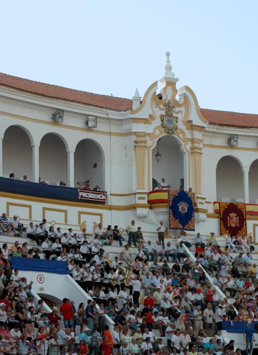 Feria de Melilla 2009